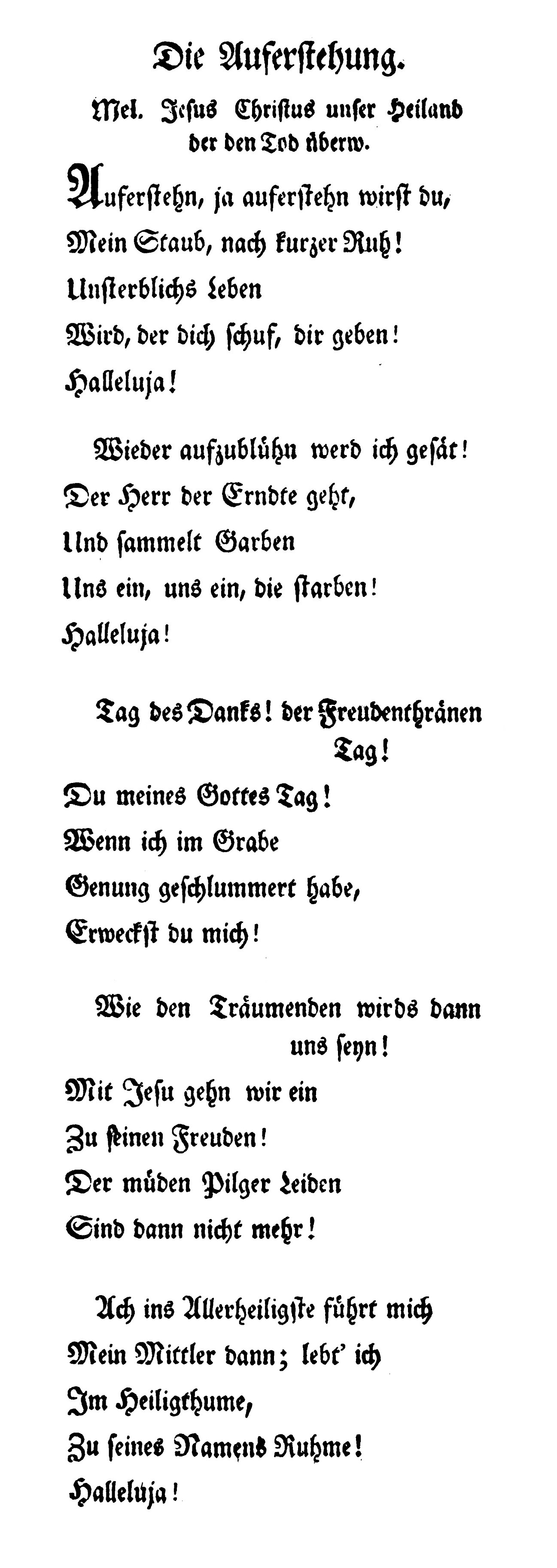 Klopstock, Erstdruck des Liedes "Auferstehn, ja auferstehn". Die Melodieangabe "Jesus Christus, unser Heiland, der den Tod überwand" bezieht sich auf die Melodieversion, die um die Mitte des 18. Jahrhunderts in Leipzig gebräuchlich war, vgl. J. S. Bach BWV 364.